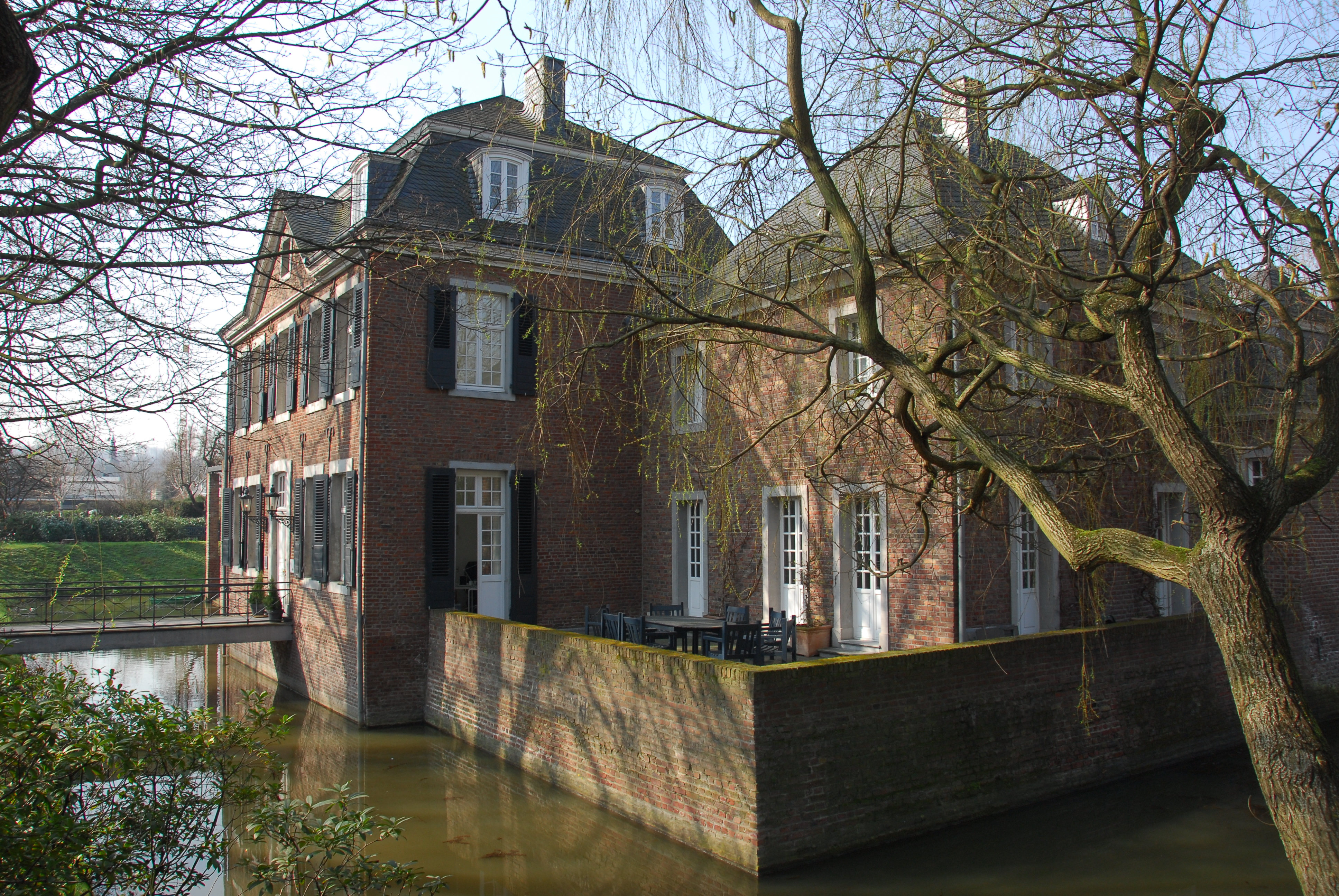 Haus Bitz, Blick auf das Herrenhaus